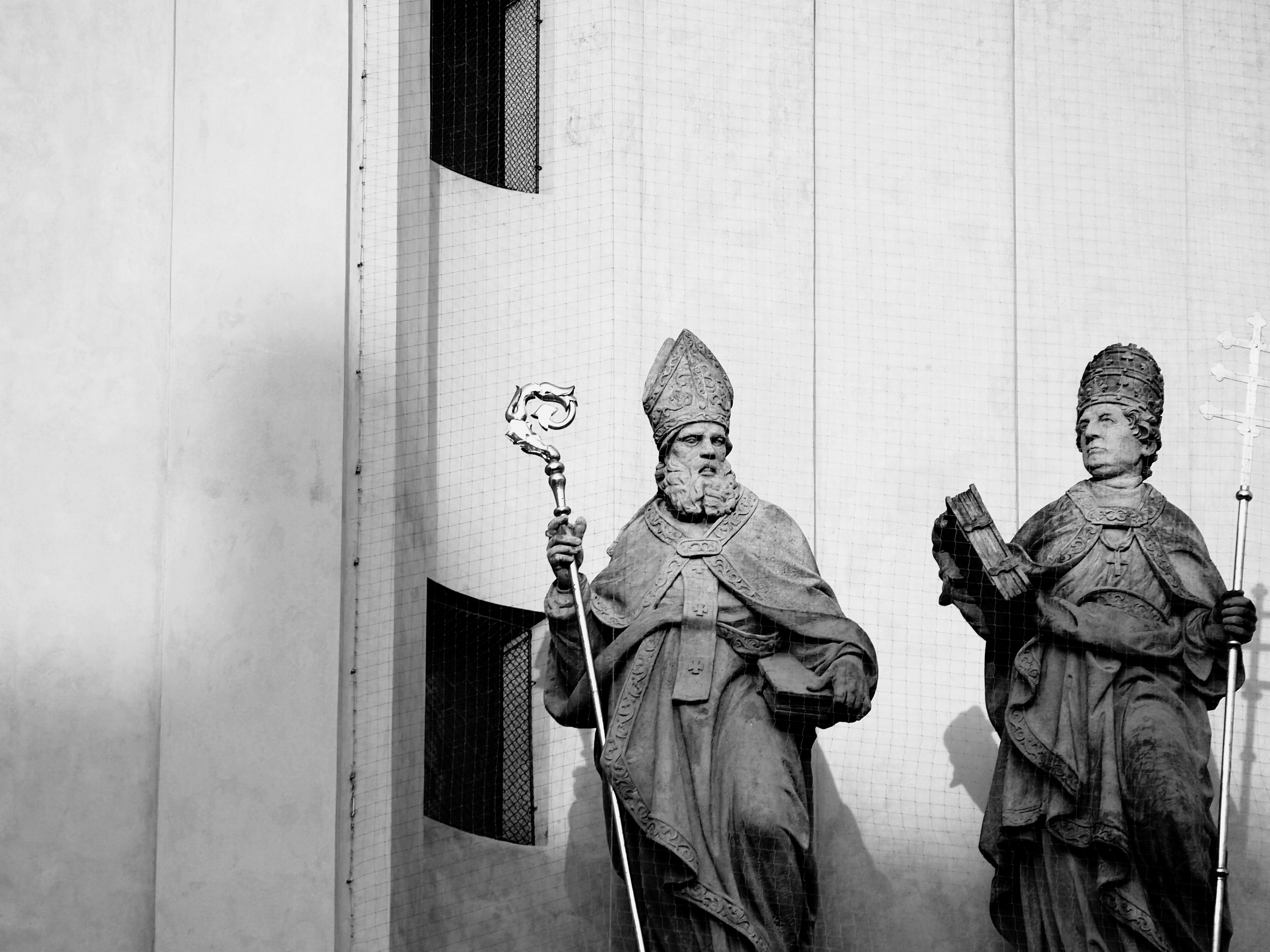 Světci na kostele svatého Mikuláše na Malé Straně